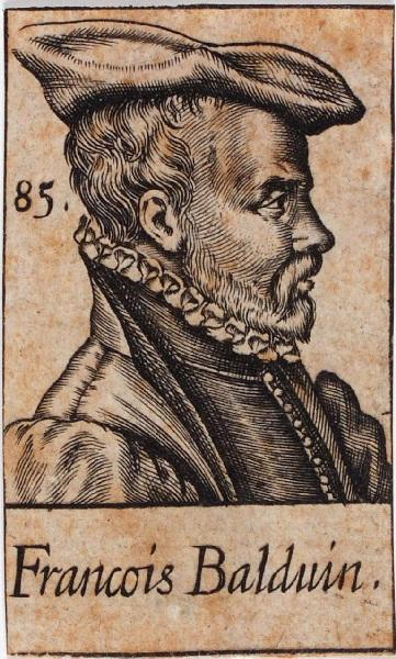 Portrait de François Baudouin. Estampe du graveur Léonard Gaultier, dans Pourtraictz de plusieurs hommes illustres qui ont flory en France depuis l'an 1500 jusques à présent.